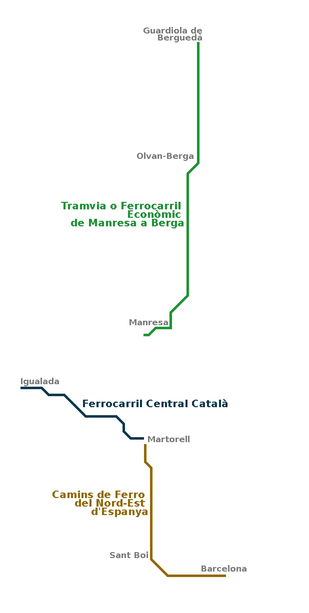 Esquema de les línies ferroviàries que va adquirir la Companyia General dels Ferrocarrils Catalans l'any 1919